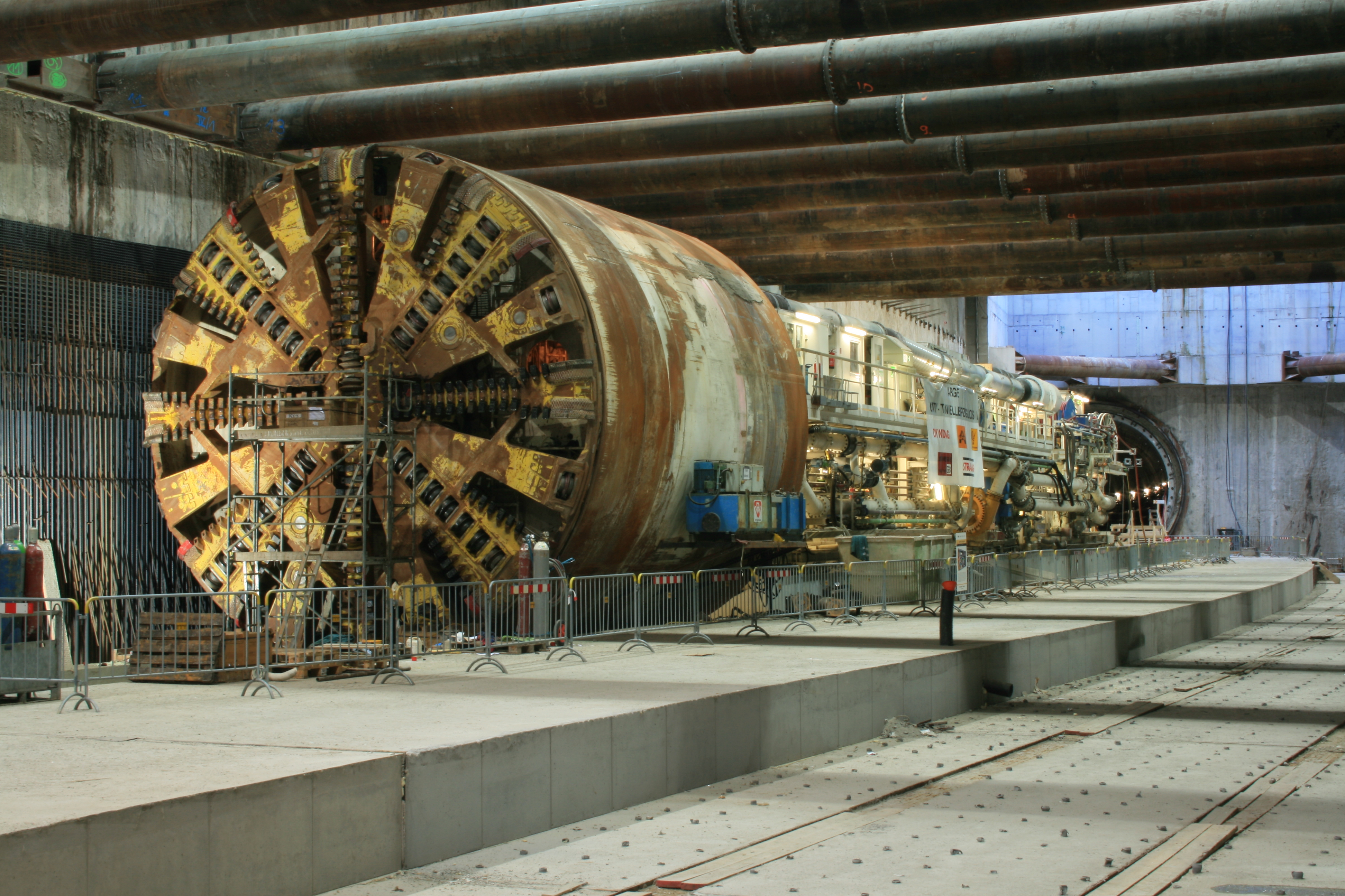 Tunnelbohrmaschine S326 City-Tunnel Leipzig in der Station Wilhelm-Leuschner-Platz, August 2007